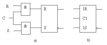 Dibujo realizado por User:Digigalos